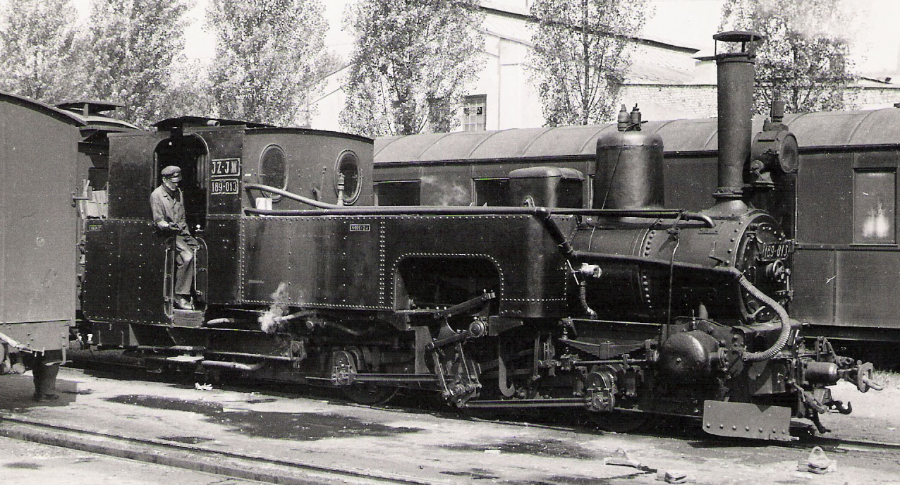 C1'n2-Stütztenderlokomotive Bauart Klose, Reihe IIIa4 (JDZ 189-013), Sarajevo